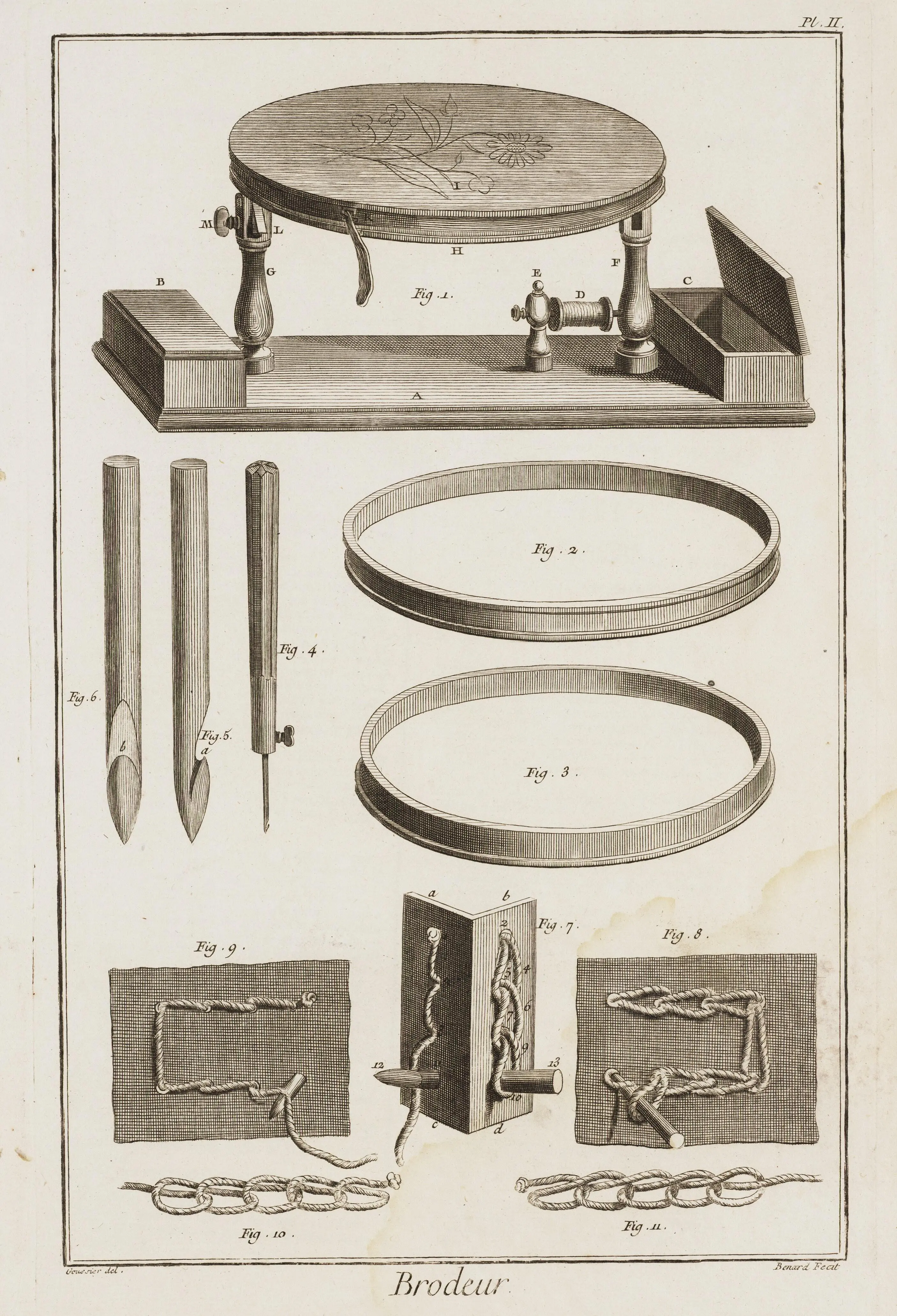 Planches de l'Encyclopédie de Diderot et d'Alembert, volume 2